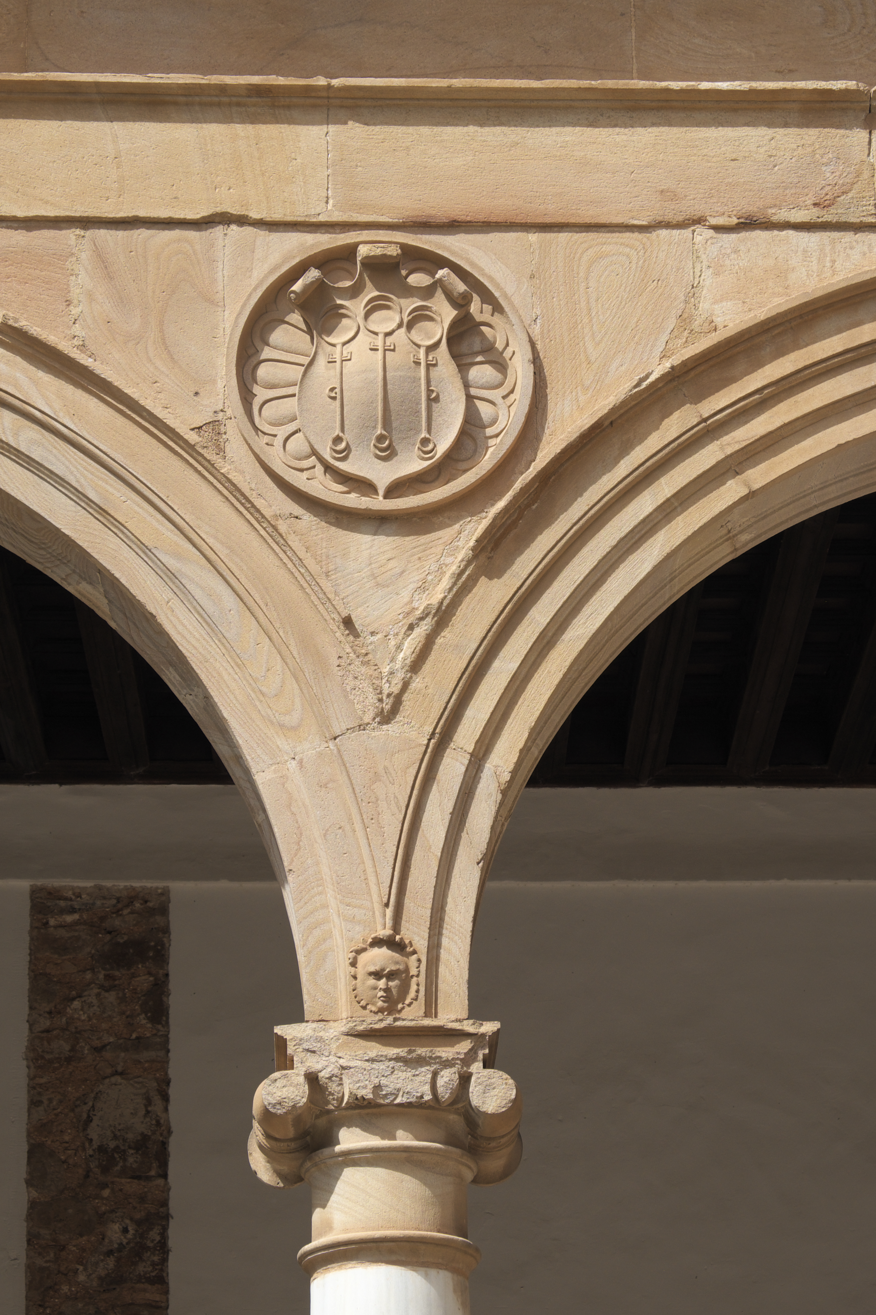 Ehemaliges Frauenkloster des Calatrava-Ordens, Convento de la Asunción (Mariä Himmelfahrt), in Almagro in der Provinz Ciudad Real (Kastilien-La Mancha/Spanien), Renaissance-Kreuzgang, Wappen der Familie Padilla mit drei Brotschiebern